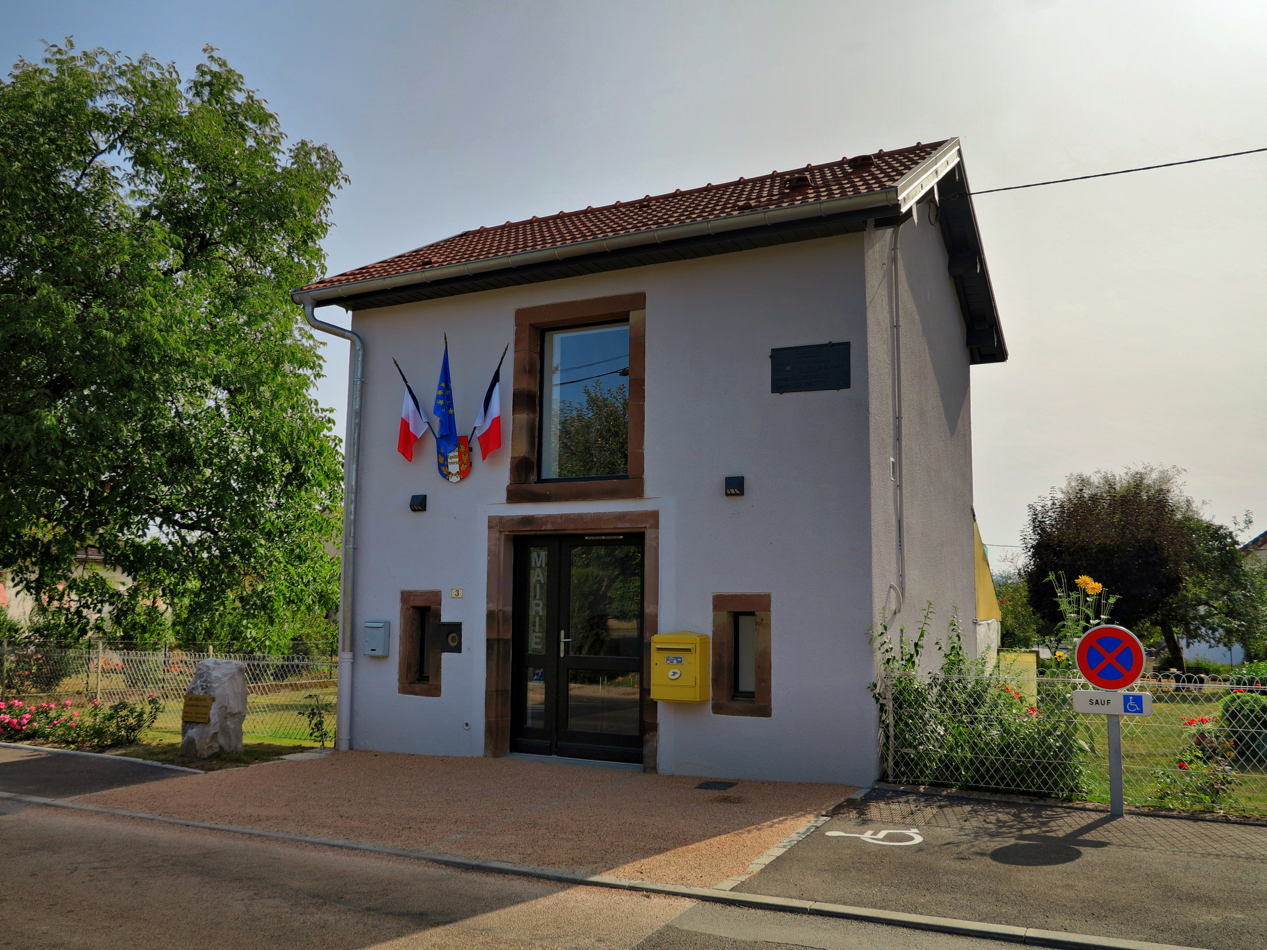 La mairie